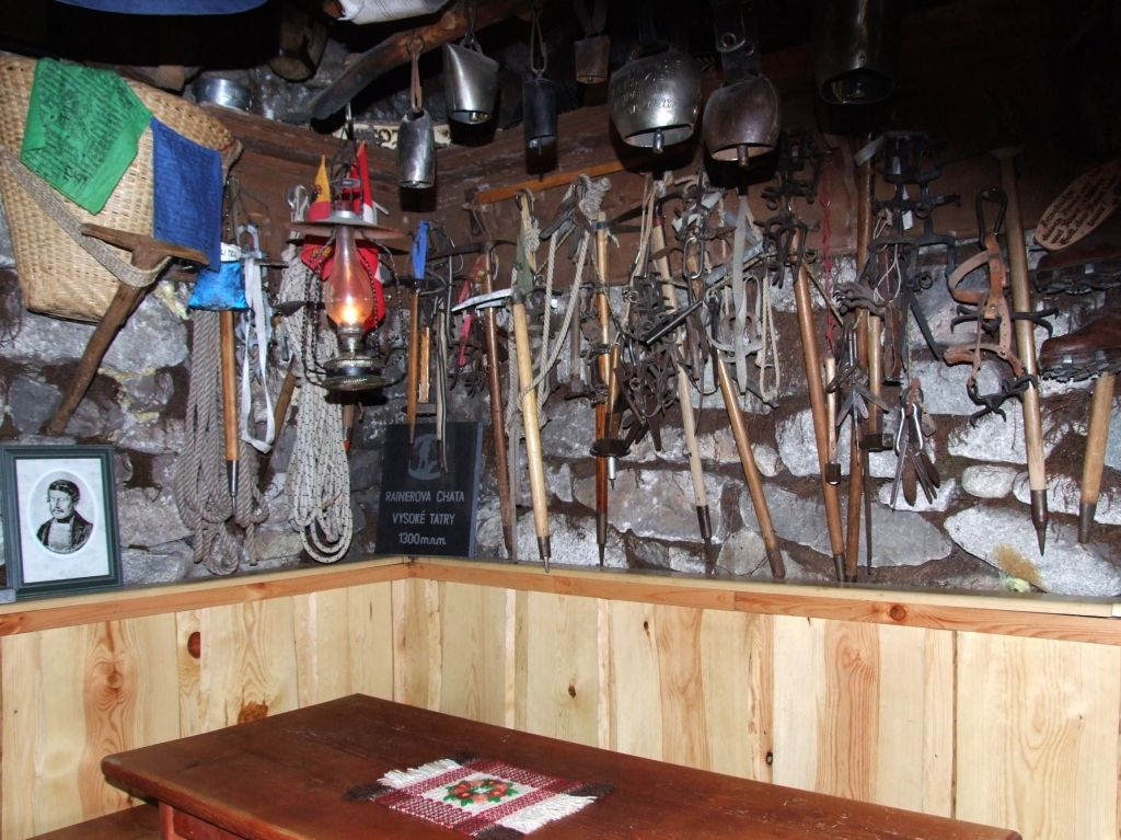 Muzeum taternictwa w Rainerowej Chacie